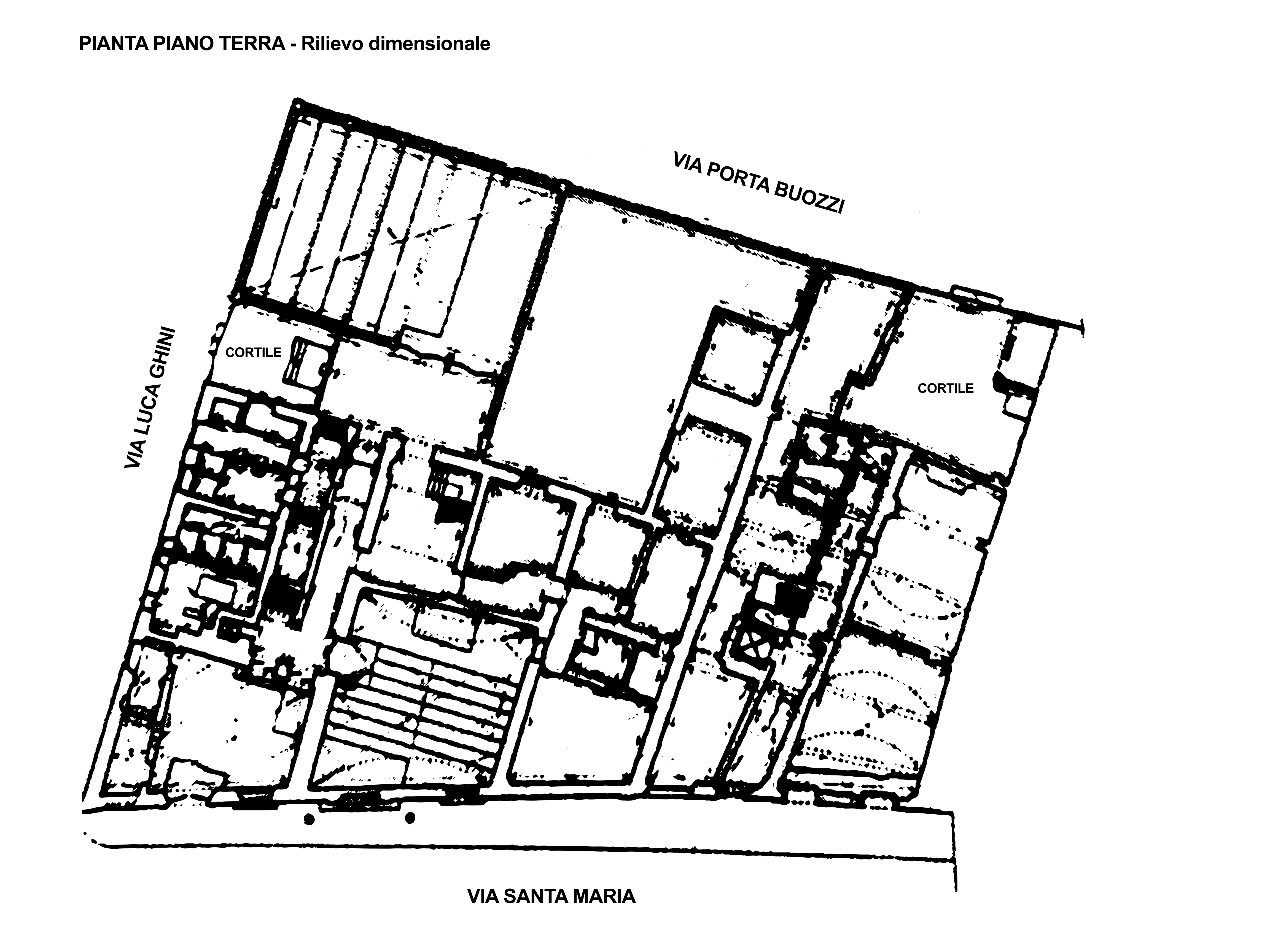 Piantina di Palazzo Boilleau sede del Dipartimento di Filologia letteratura e linguistica dell' Università di Pisa